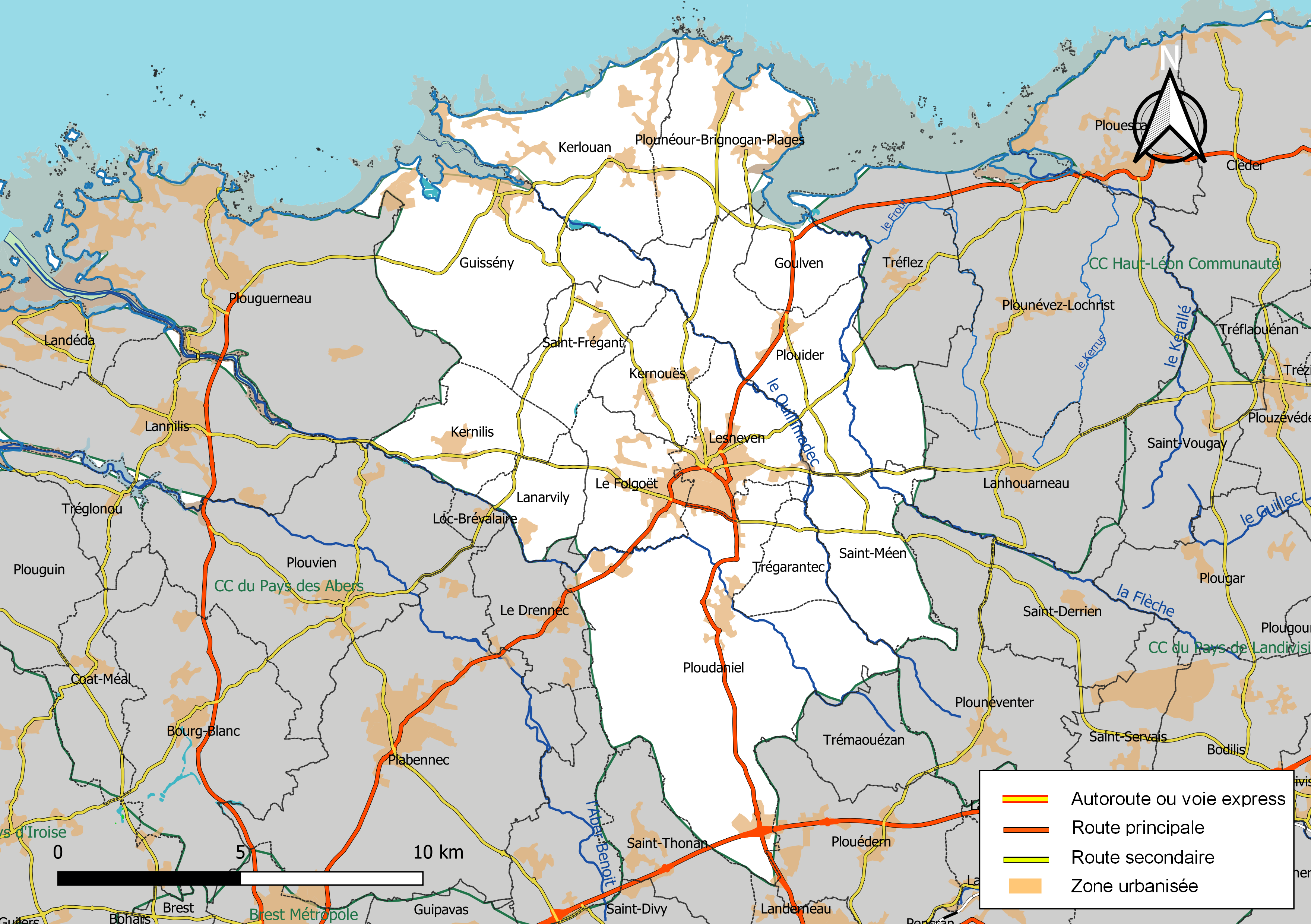 Carte géographique de la Communauté Lesneven Côte des Légendes, département du Finistère, France. Composition au 1er janvier 2019.